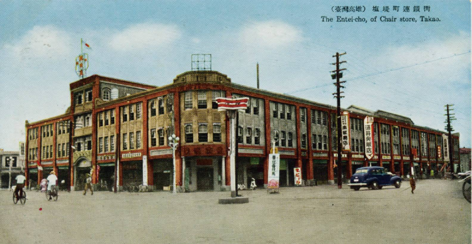 高雄鹽堤町街屋。